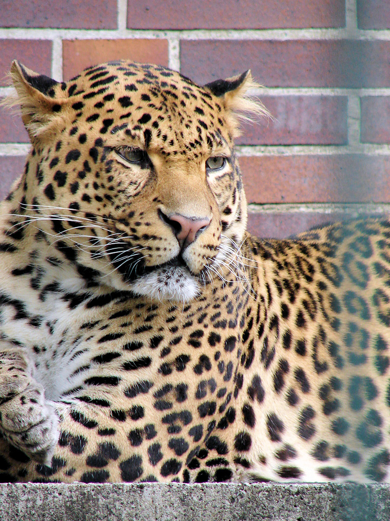 Tier im Zoologischen Garten Berlin